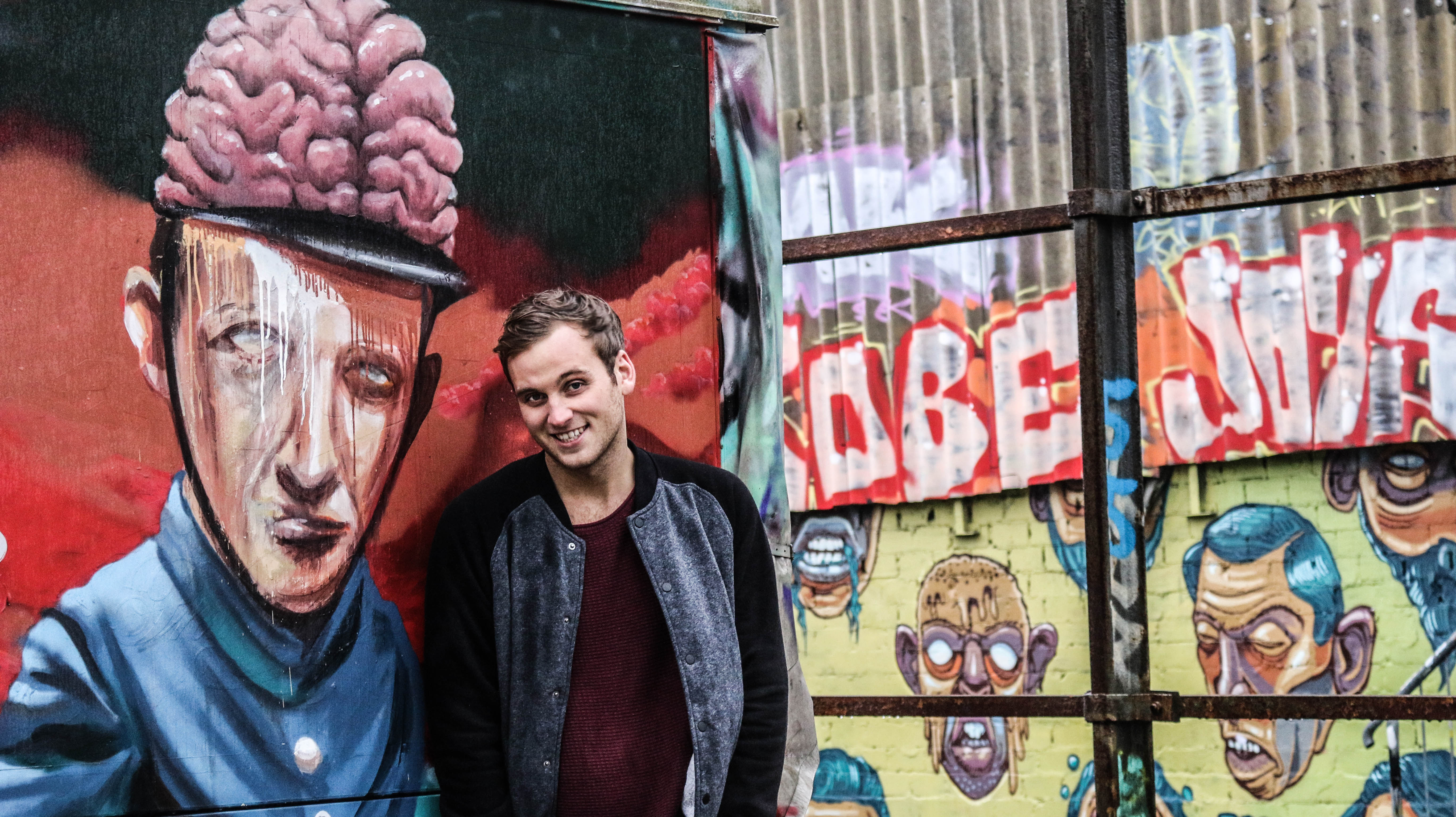 Leon Windscheid